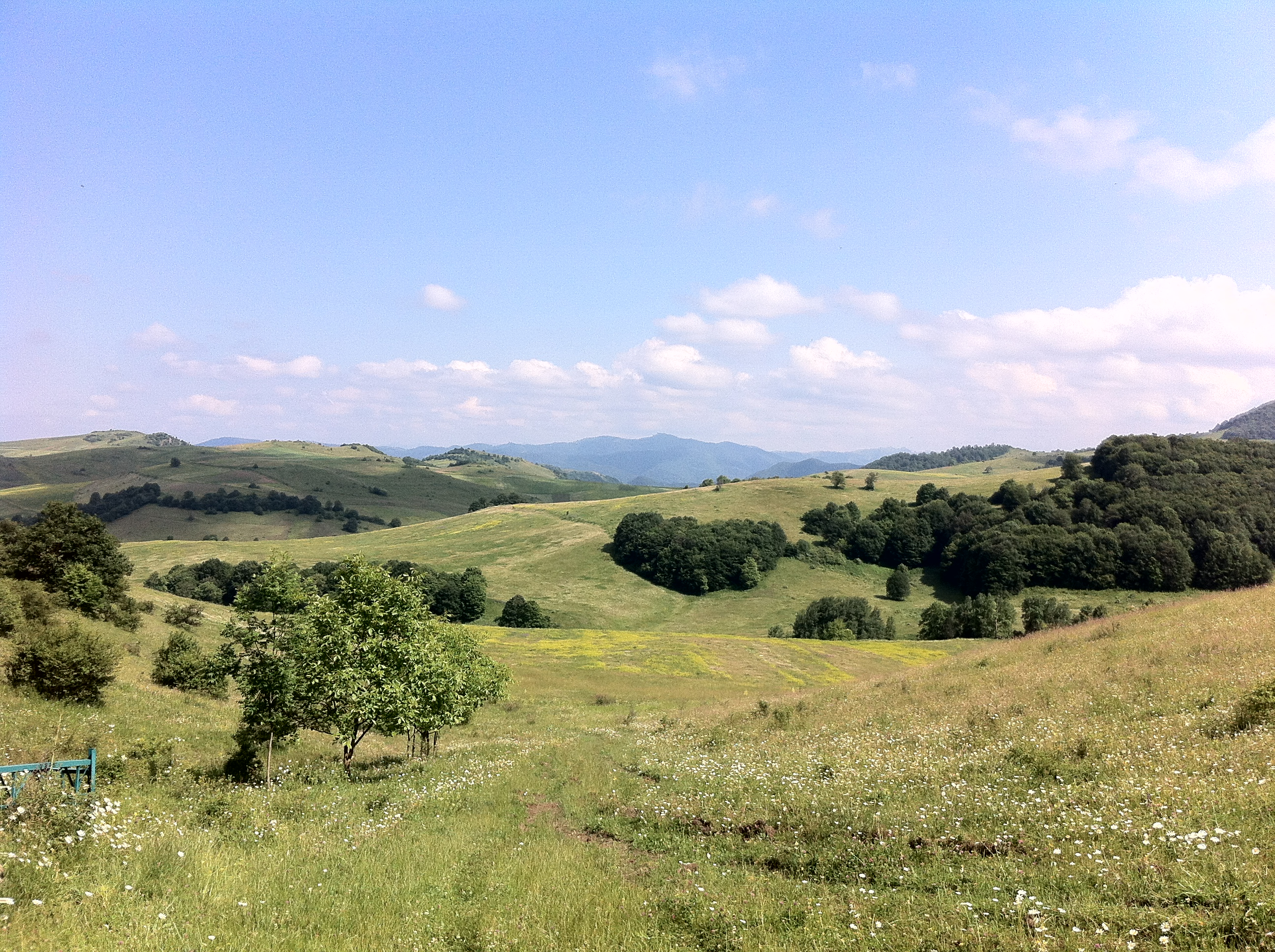 ՀՀ Տավուշի մարզի բնությունը (Շամշադին)